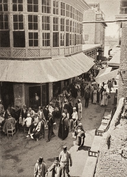 المقهى يقع في المصبغة والصورة من اعمال المصور عبد الكريم ونشرها في كتابهِ المصور عن العراق في العشرينيات قبل تاأسيس مقهى الشابندر في شارع المتنبي